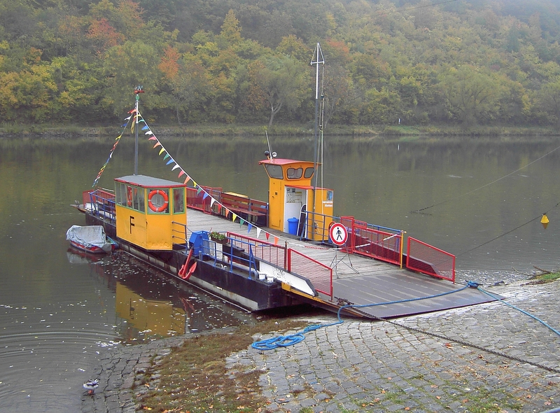 Historische Fähre in Klotten / Mosel